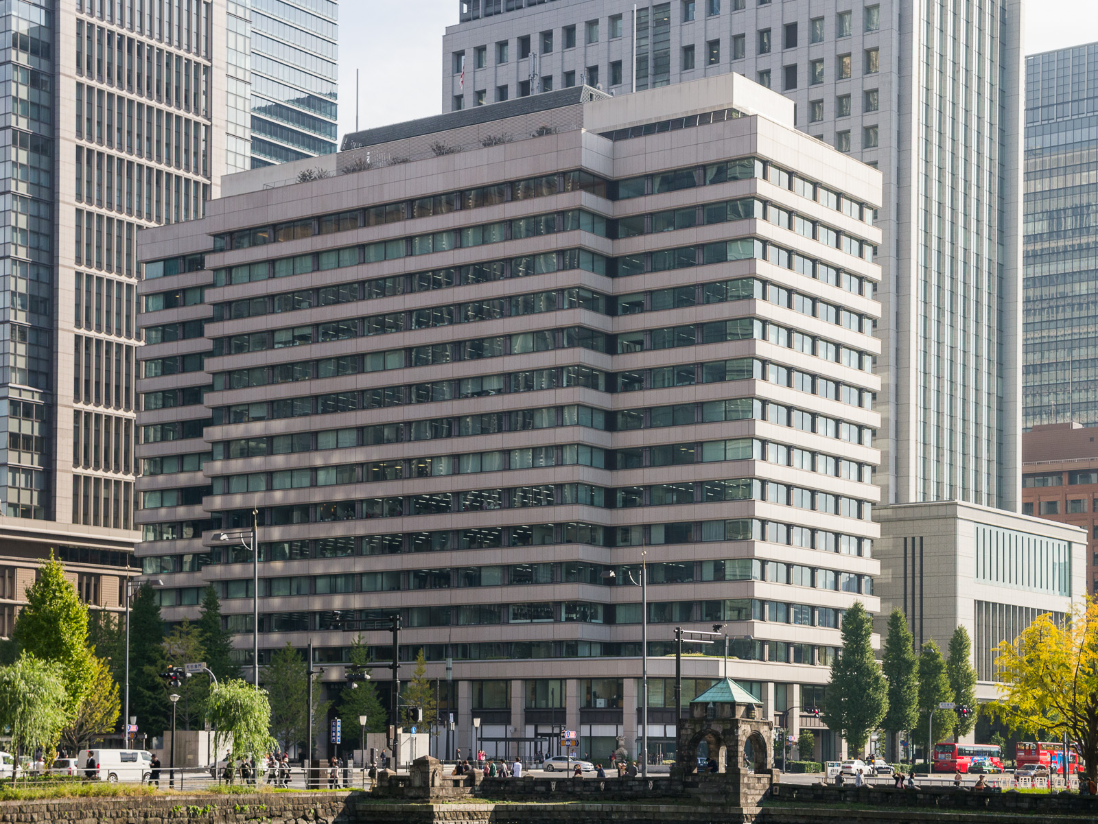 郵船ビル、東京都千代田区丸の内。